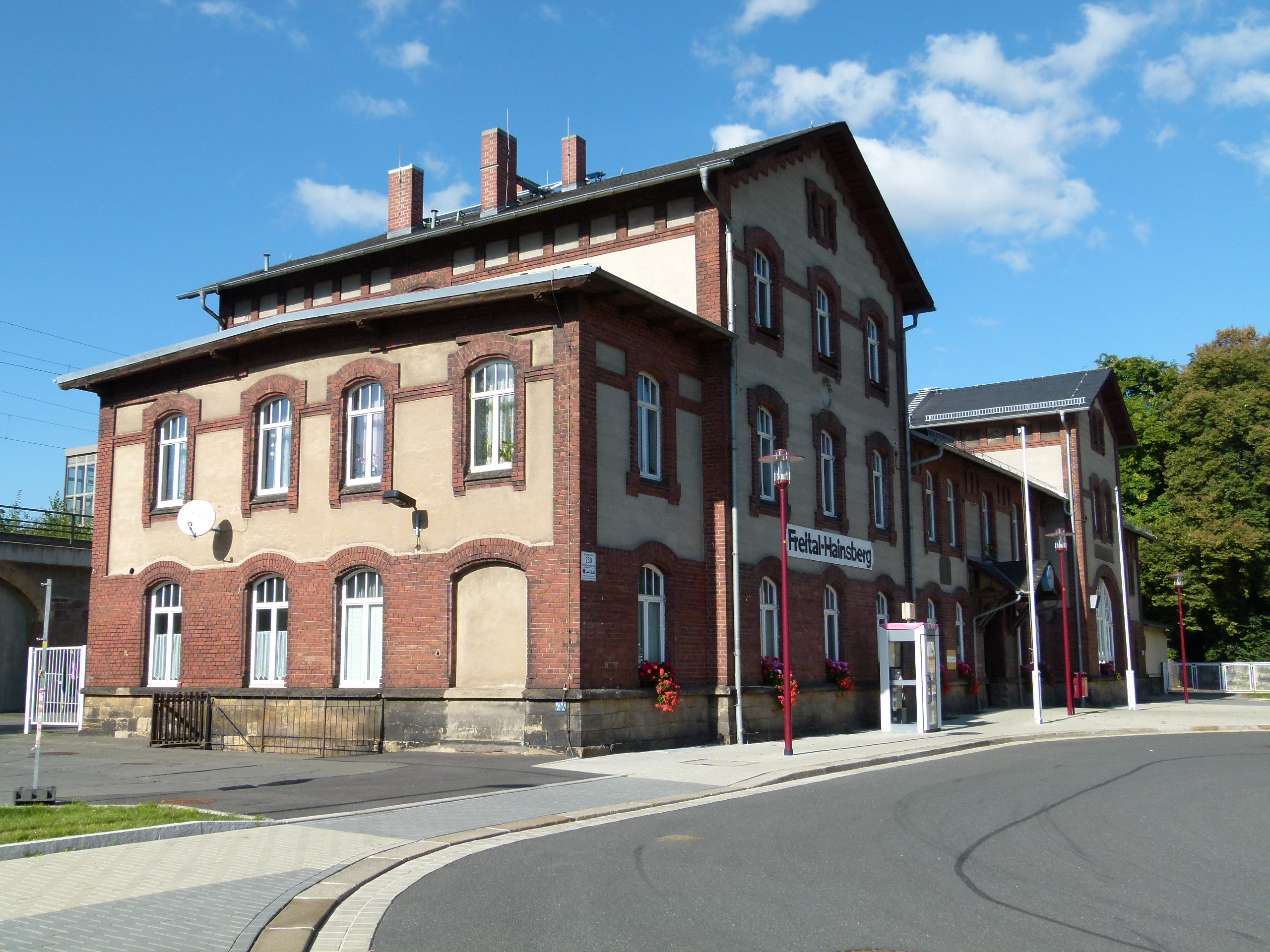 Bahnhof, Freital-Hainsberg